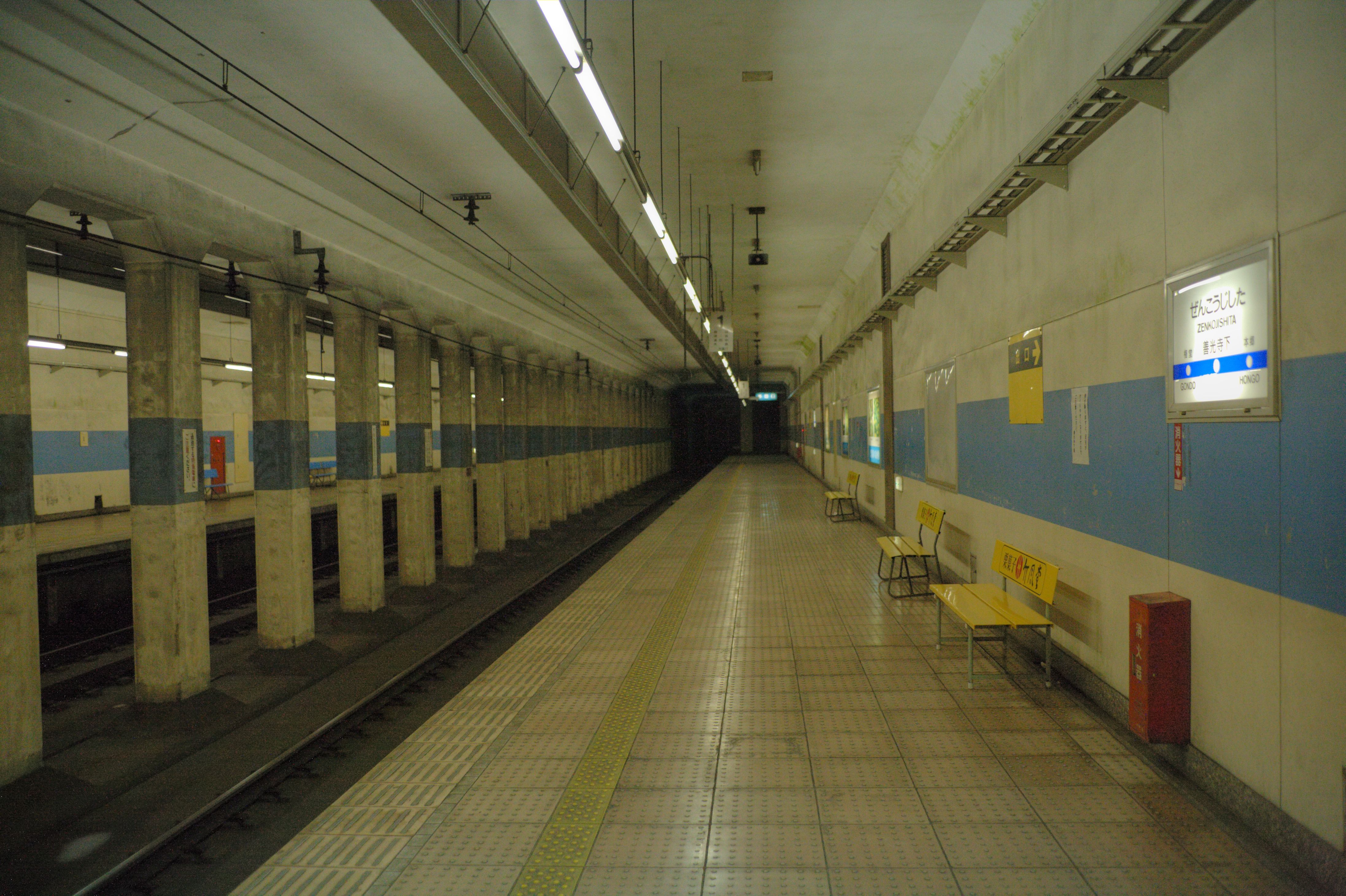 善光寺下駅